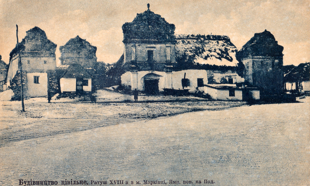 Ратуша у селі Марківка Томашпільського району Вінницької області